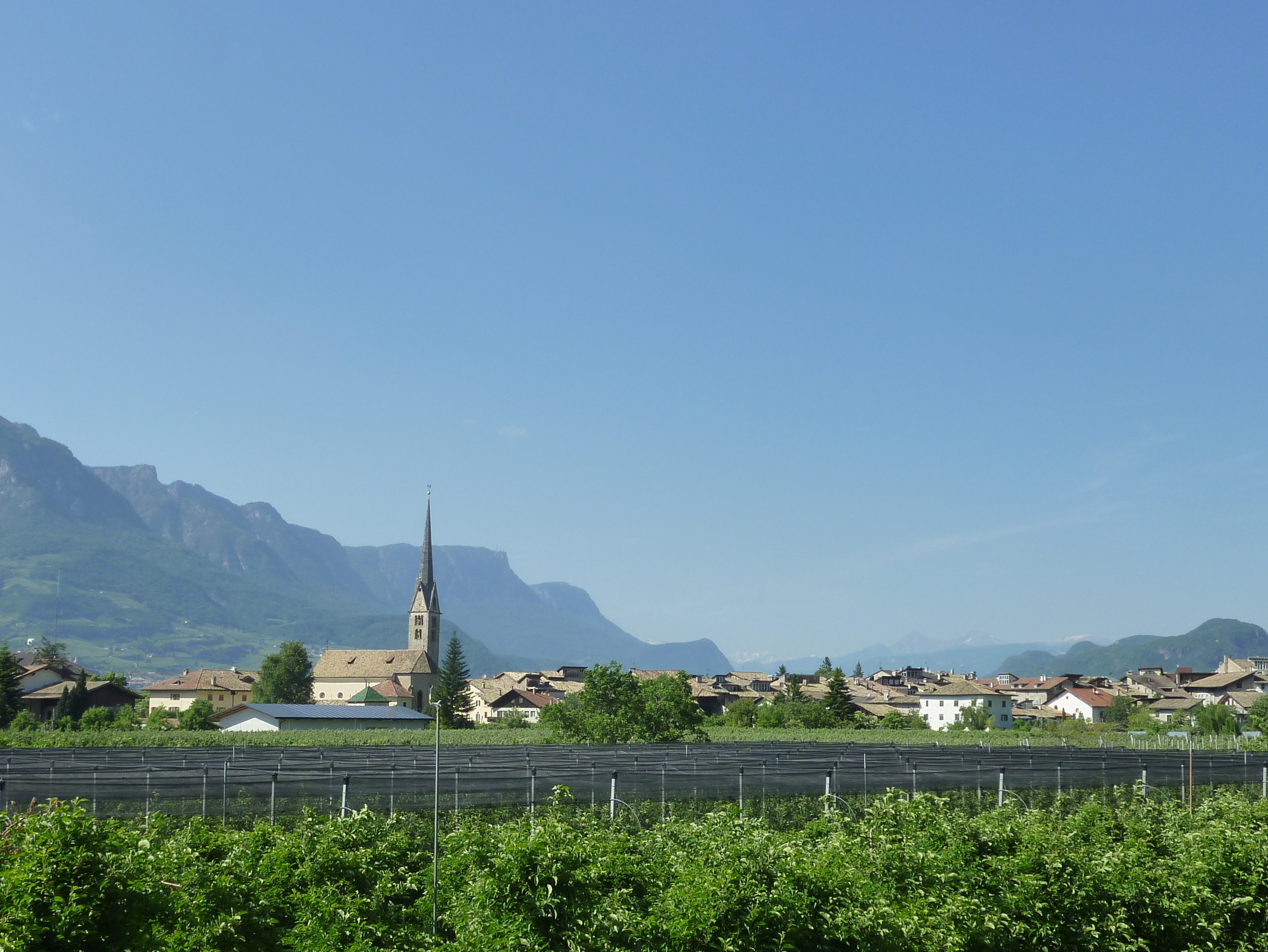 Neumarkt (Südtirol)